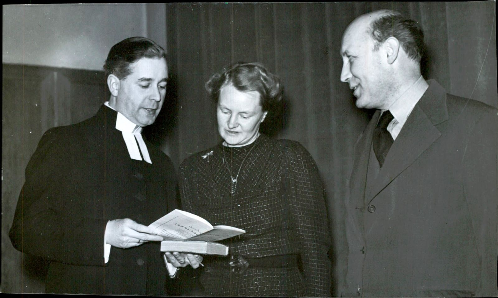 Foto på pastor Gösta Hagelin, fru Birgitta Weman och pastor John Nilsson infört i Svenska Dagbladet 1942-02-10.